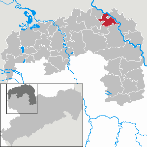 Elsnig in Saxony - Landkreis Nordsachsen